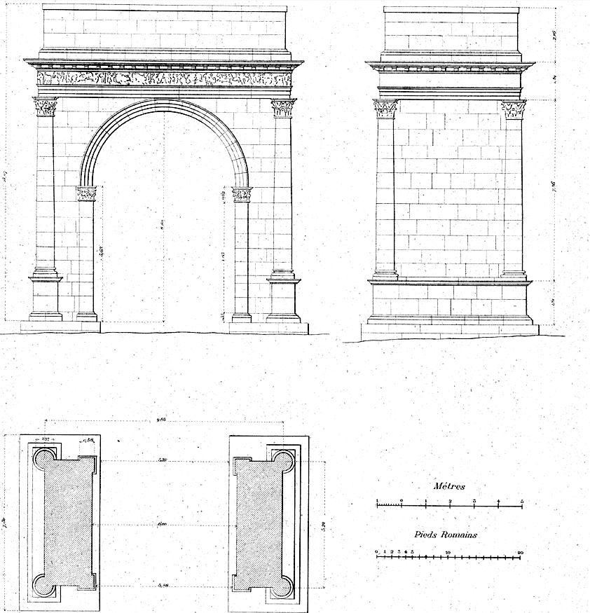 Augustusbogen, Susa, Aufrisse und Plan